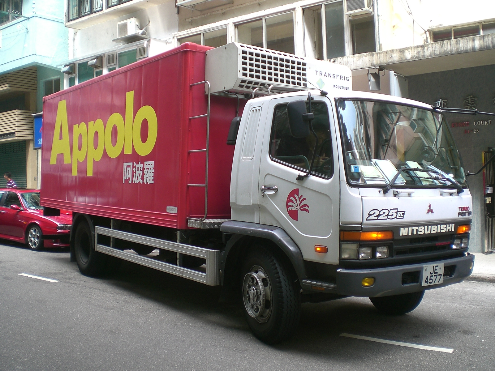 香港跑馬地奕蔭街載貨汽車